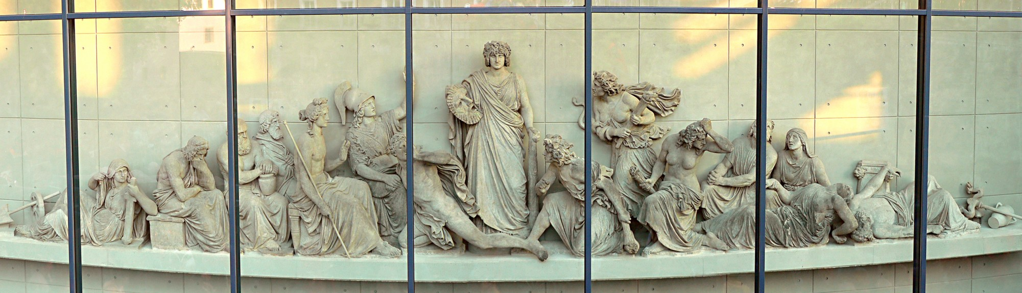 Der Rietschelgiebel auf der Ortenburg in Bautzen in Sachsen, fotografiert von der Zuschauertraverse des Theatersommers. Hornjoserbsce: Rietschelowe swisle při dźiwadle na hrodźe w Budyšinje.